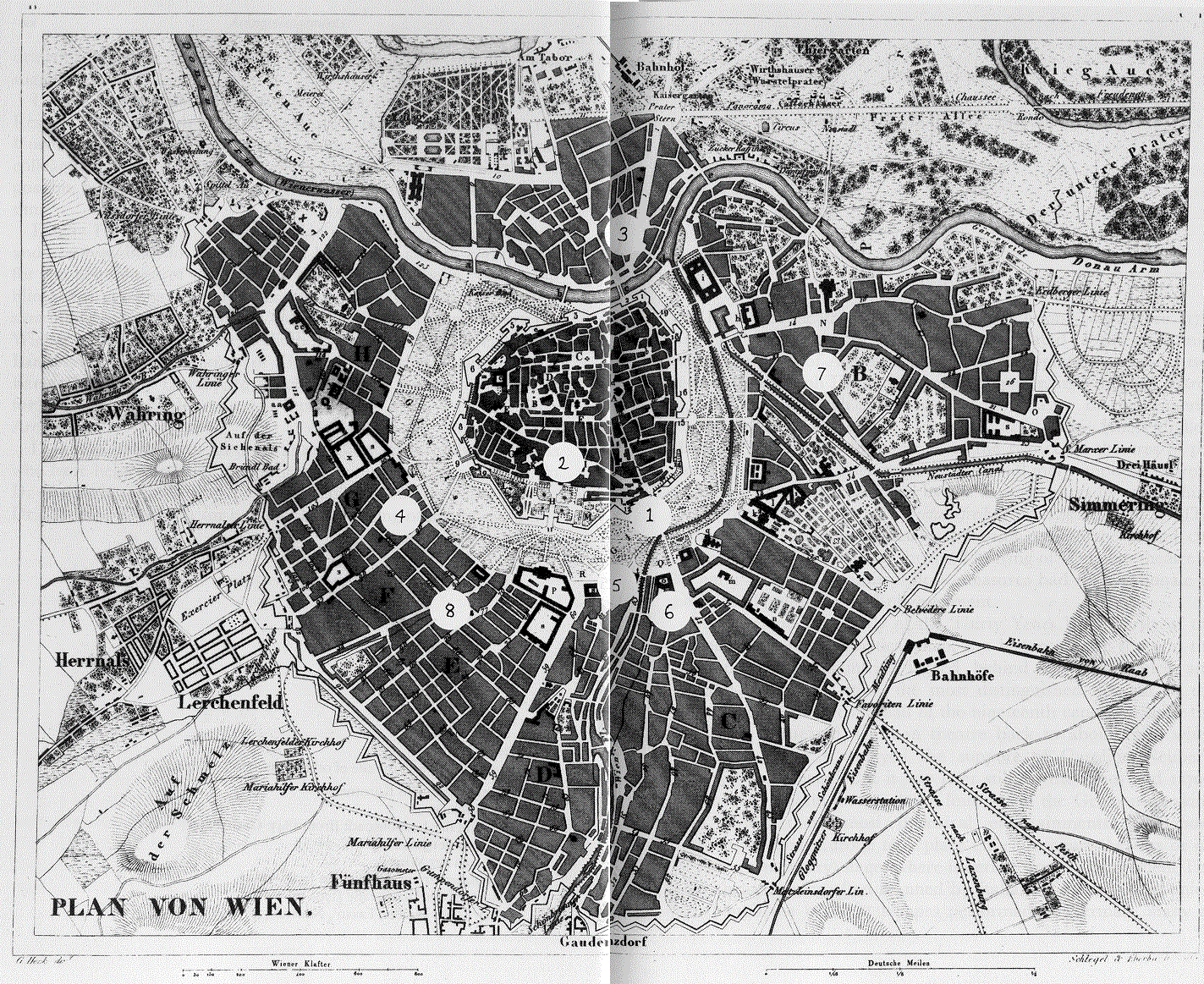 Wien Karte um 1850